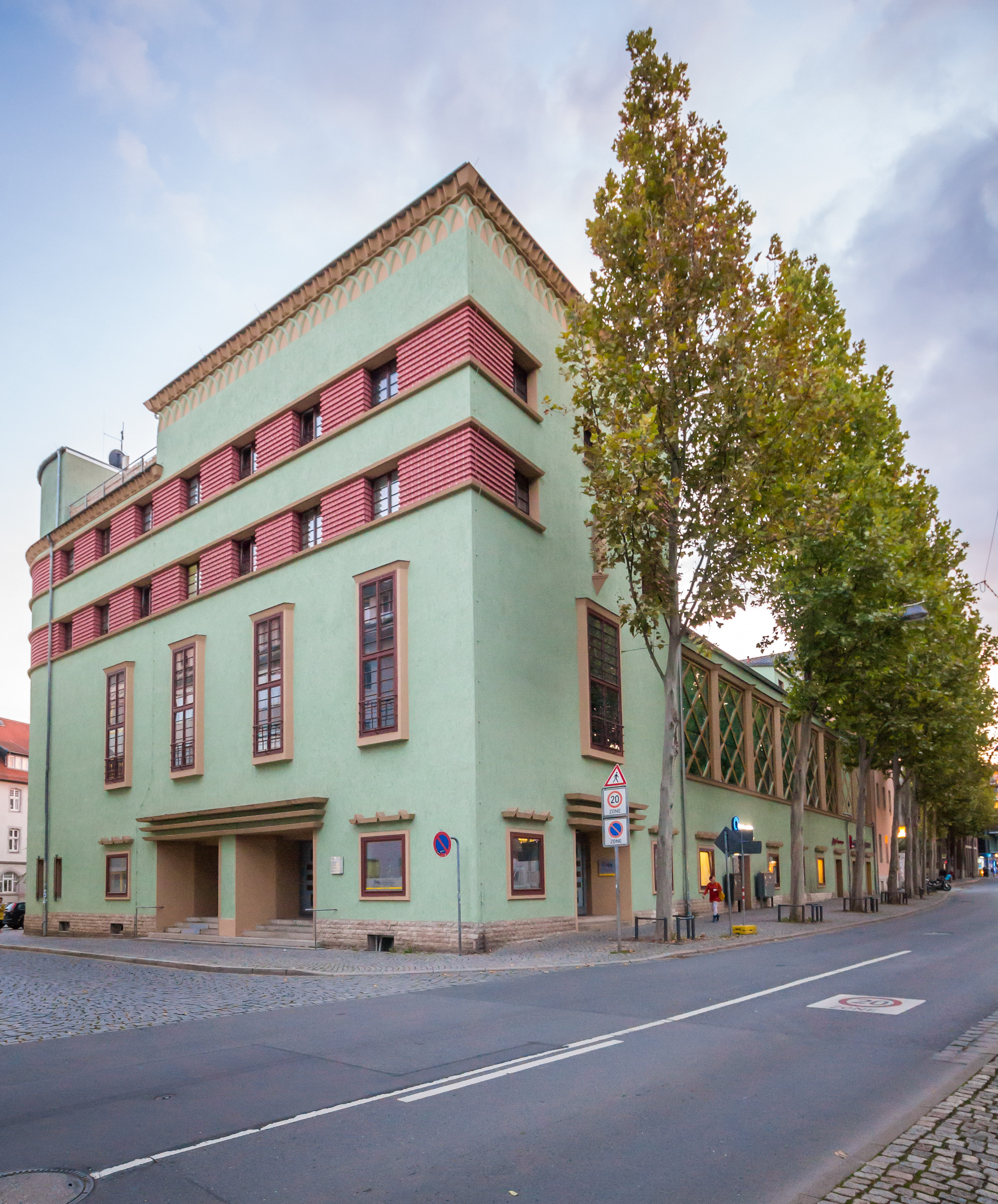 Ehemaliges Kino Capitol in Jena, Paradiesstraße 6 / Löbdergraben